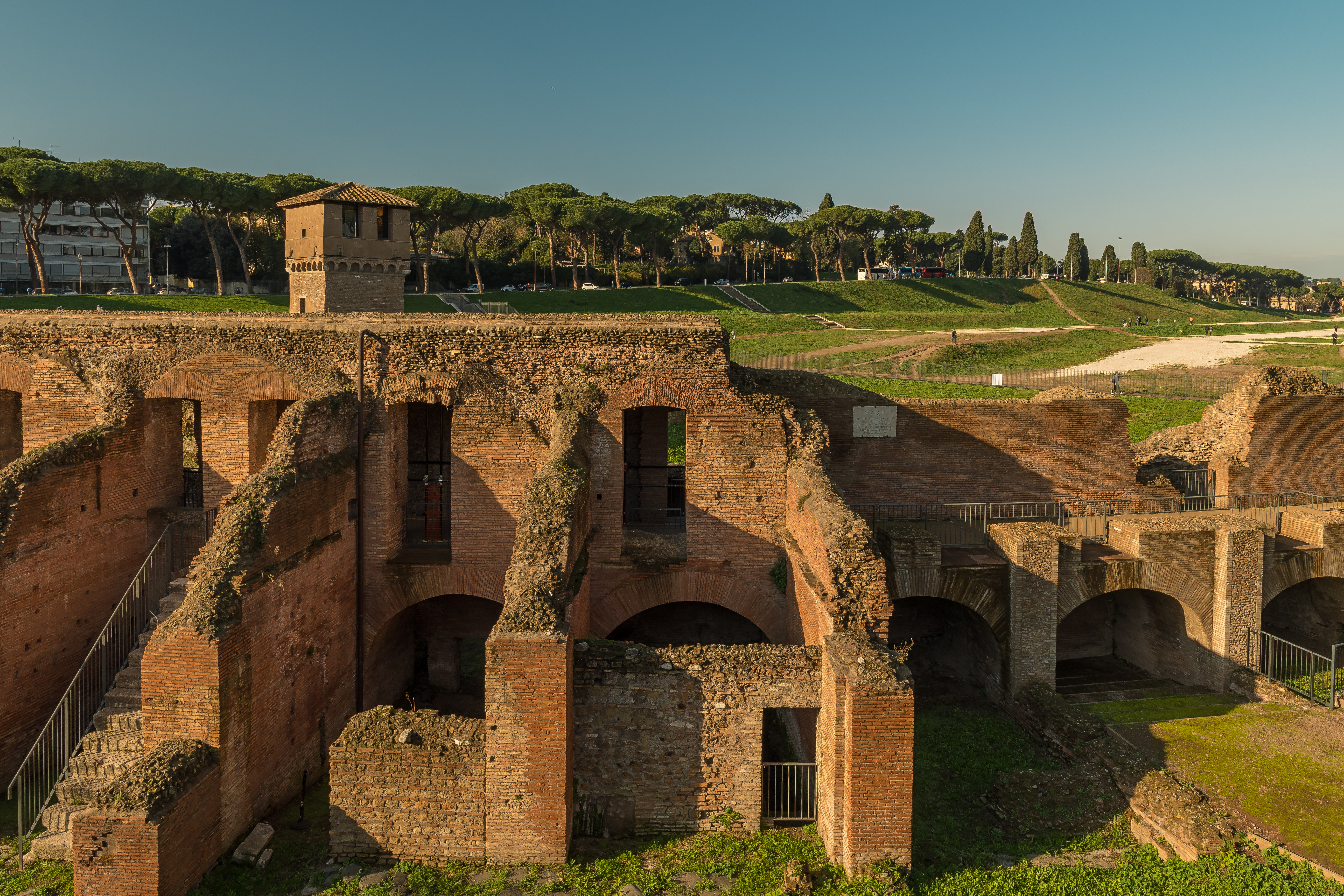 Der Circus Maximus von der Südosttribüne im November 2018 gesehen